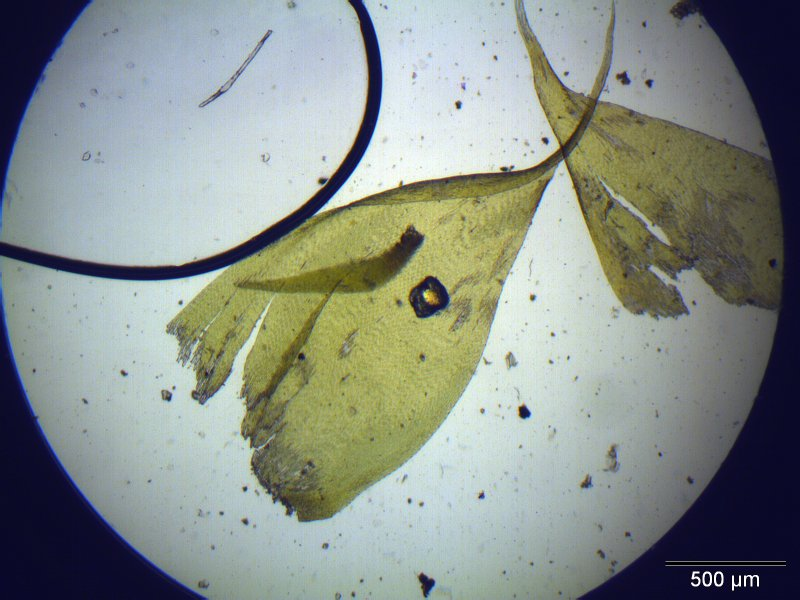 Geschwollenes Zypressen-Schlafmoos (Hypnum lacunosum), Blatt, Vergrößerung: 40x